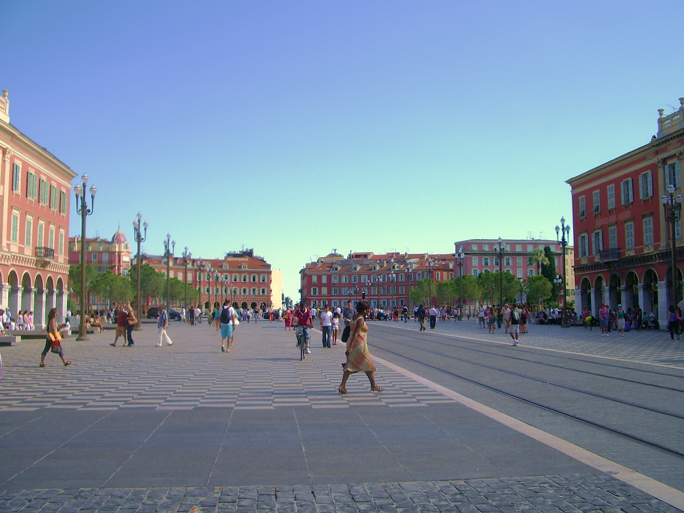 Vue du Sud de la Place Masséna de Nice.